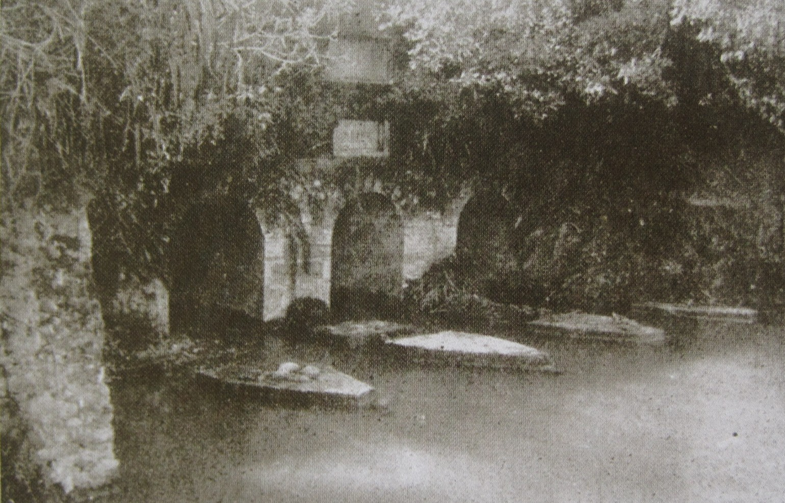 日治時期的曹公圳舊圳頭